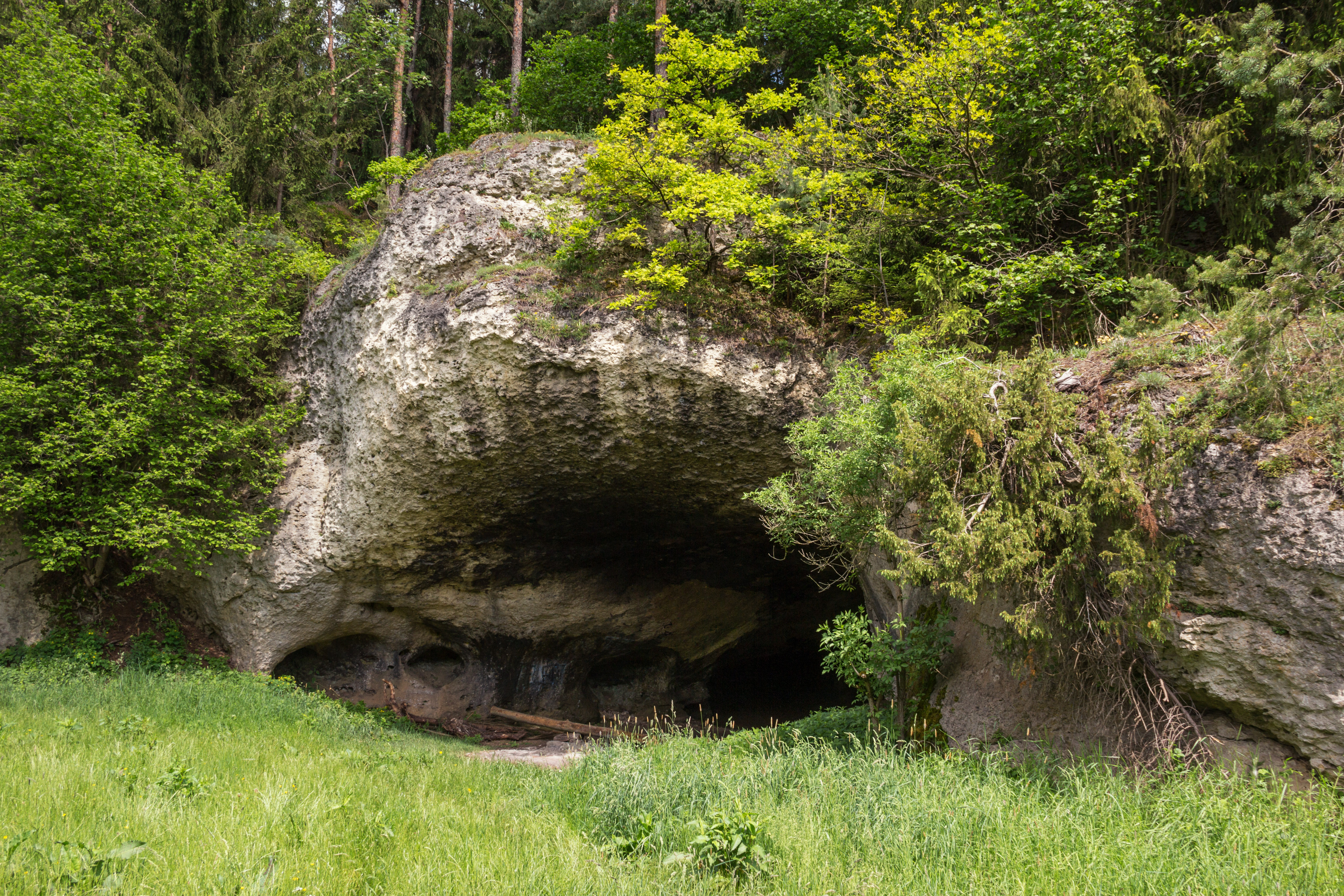 Felslindl, Eingang, Karsthöhle, Geotop, Naturdenkmal, Naturpark Fränkische Schweiz-Veldensteiner Forst, Auerbach i.d.OPf.